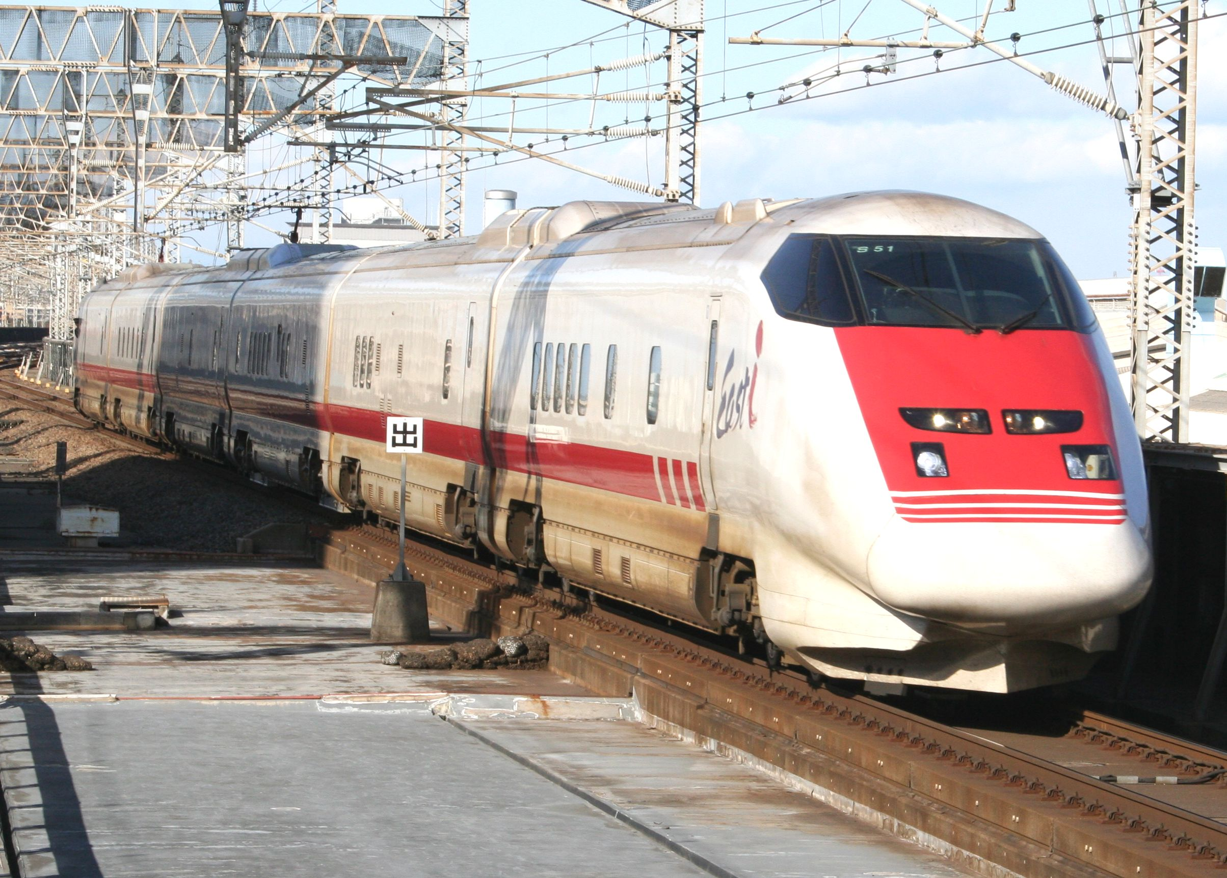 新幹線E926形電車